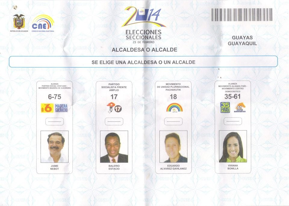 Papeleta de votación de las Elecciones municipales de Guayaquil de 2014 para alcaldes. Es una imagen pública que sirve para graficar el artículo.